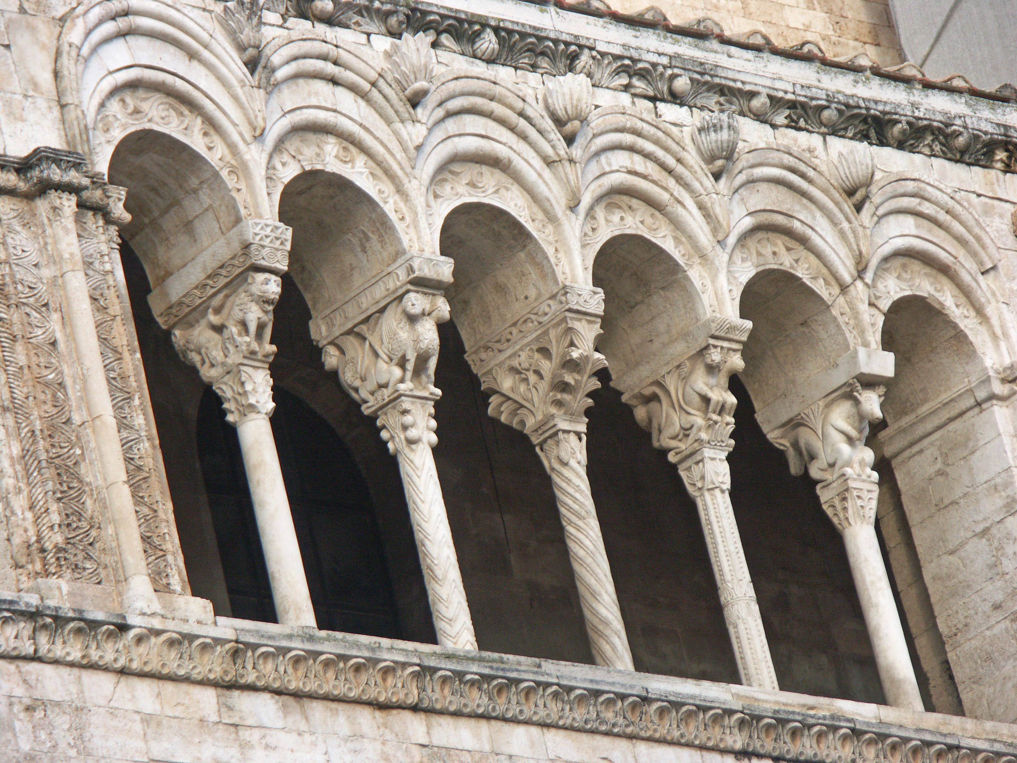 Les colonnettes et chapiteaux de la galerie de la façade méridionale